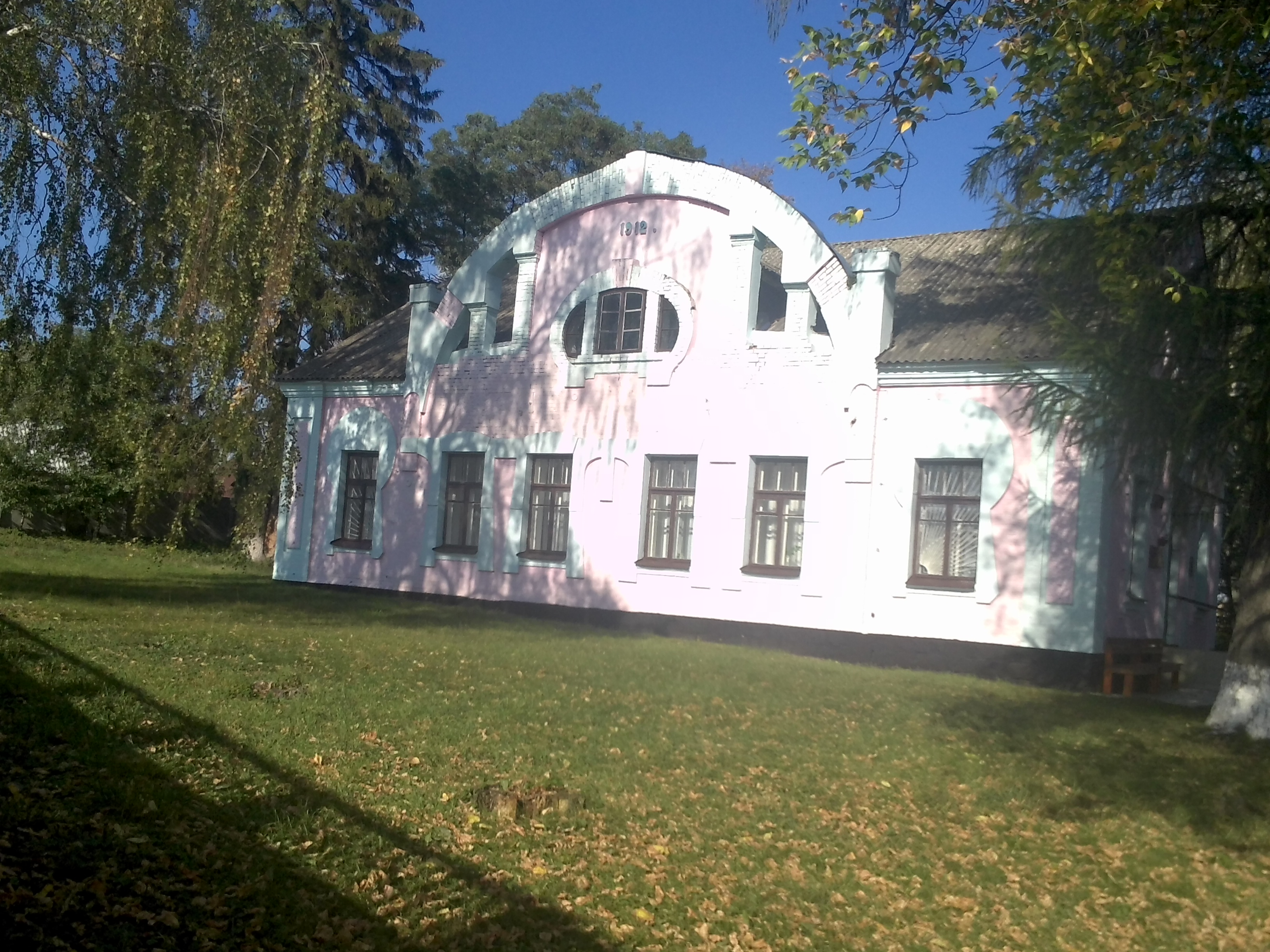 Турбівська міська лікарня